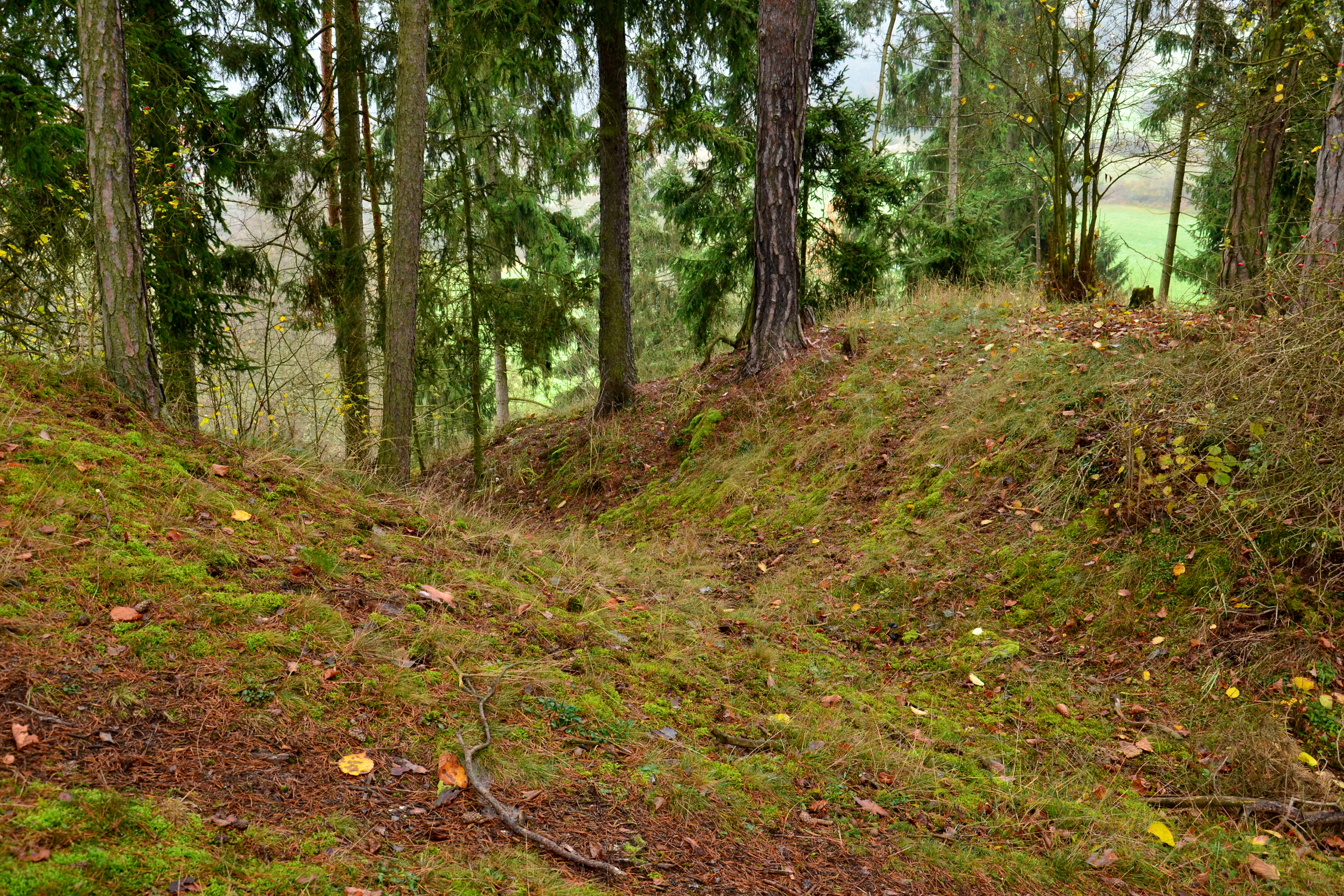 Druhý příkop, výšinné opevněné sídliště, Hrádek (Manětín).